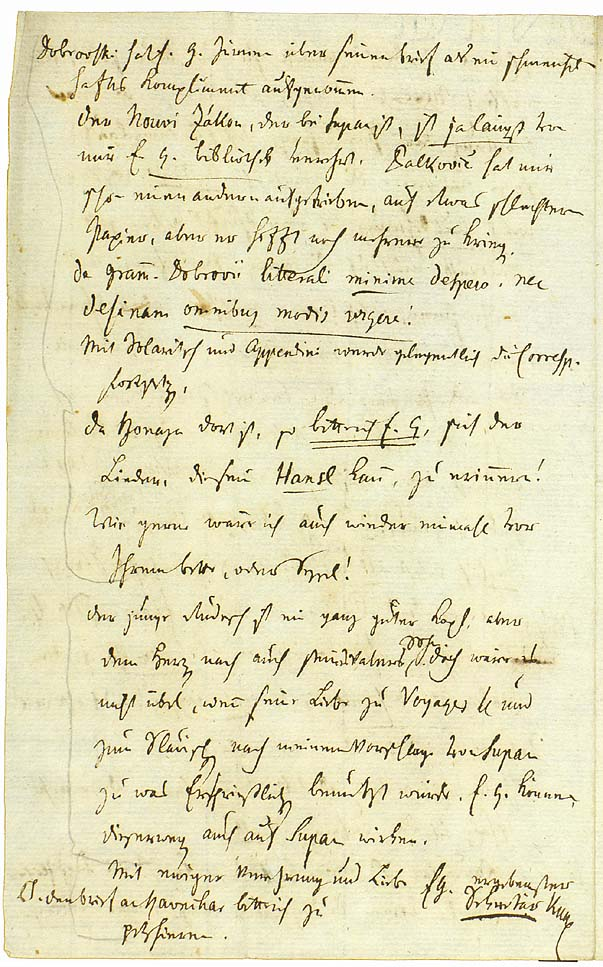 Dobrovský je jezo Vaše milosti nad njegovim pismom vzel kot laskav kompliment. Nouvi zákon, ki je pri Zupanu, sem vendar že davno posvetil knjižnici Vaše milosti; Palković mi je že priskrbel drugega na nekoliko slabšem papirju, vendar upa, da jih bo dobil še več. De Gramm. Dobrovii litterali minime despero, nec desinam omnibus modis urgere! Dopisovanje s Solarićem in Appendinijem bom nadaljeval ob priložnosti. Ker je Bonazza tam, prosim Vašo milost, da se spomni pesmic, ki jih zna njegov Janezek! Kako rad bi bil že spet enkrat pred Vašo posteljo ali stolom! Mladi Rudež je prav bistre glave, po srcu pa vendarle tudi sin svojega očeta. Vendar ne bi bilo slabo, če bi Zupan po mojem predlogu njegovo ljubezen do voyages itd. in do slovanstva uporabil za kaj vzpodbudnega. Vaša milost lahko po tej poti vpliva tudi na Zupana. Z večnim spoštovanjem in ljubeznijo, Vaši milosti vdani tajnik Kopitar l. r. P. S. Prosim, da se pismo Ravnikarju zapečati.